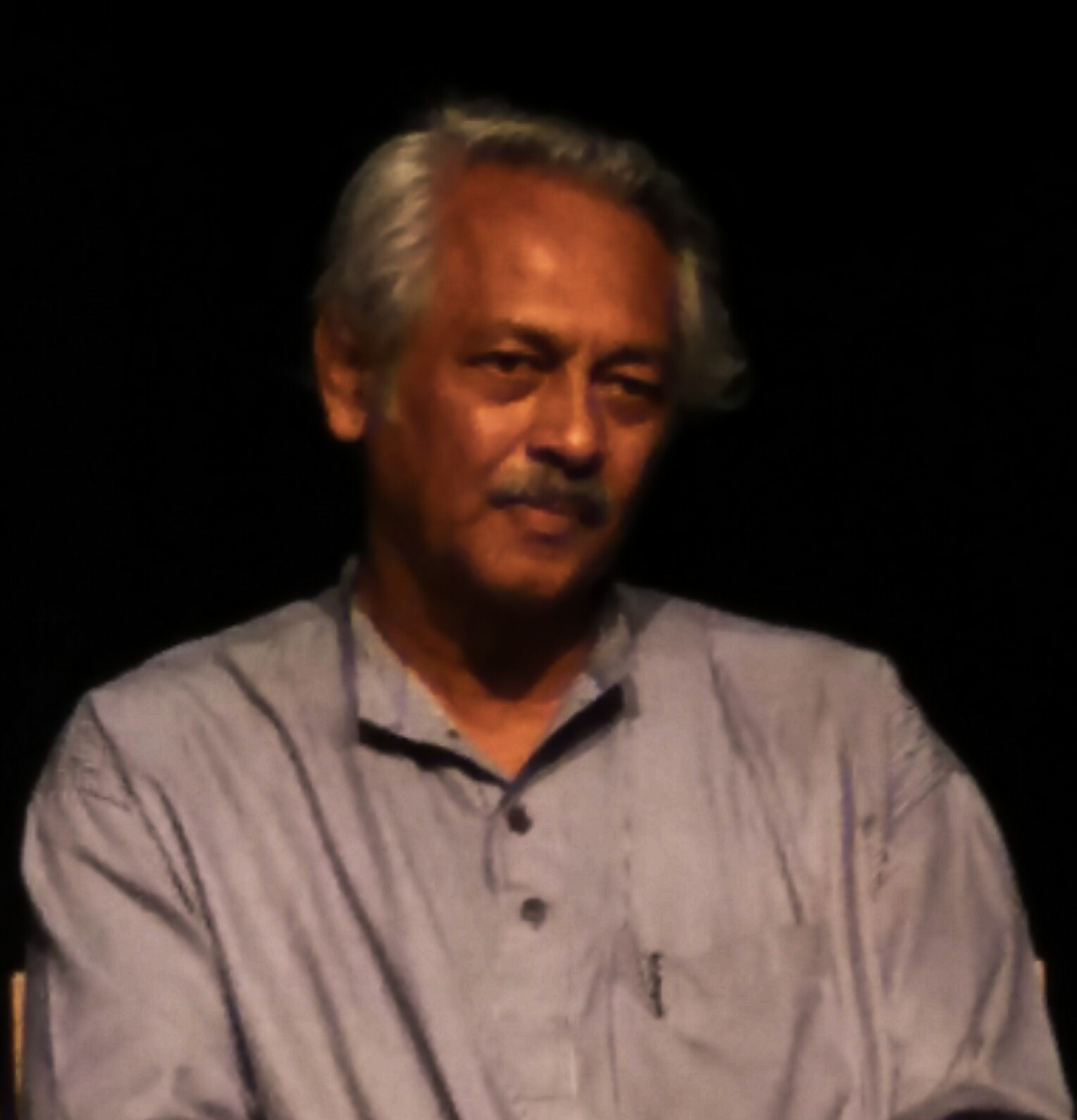 Girish kasaravalli Kannada parallel movie director.